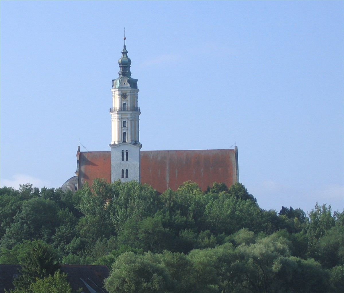 Donauwoerth, Kloster Heilig Kreuz